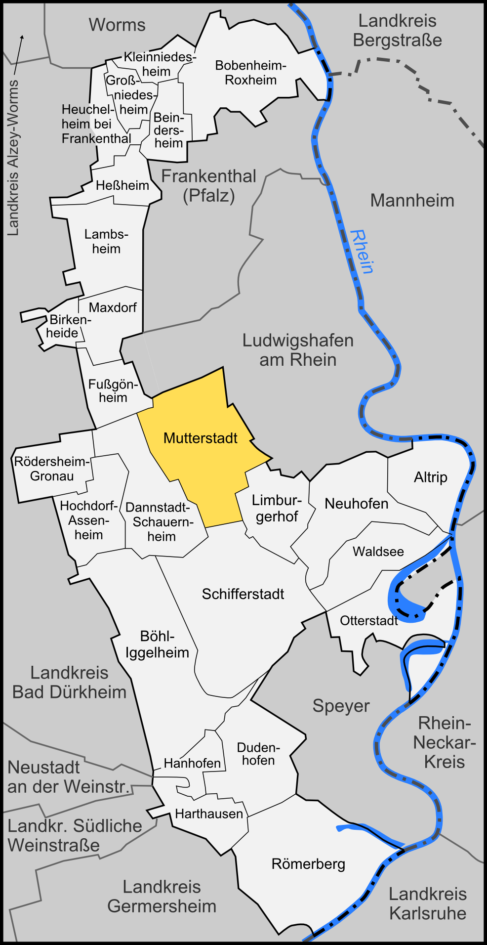 Karte der Gemeinde Mutterstadt im Rhein-Pfalz-Kreis